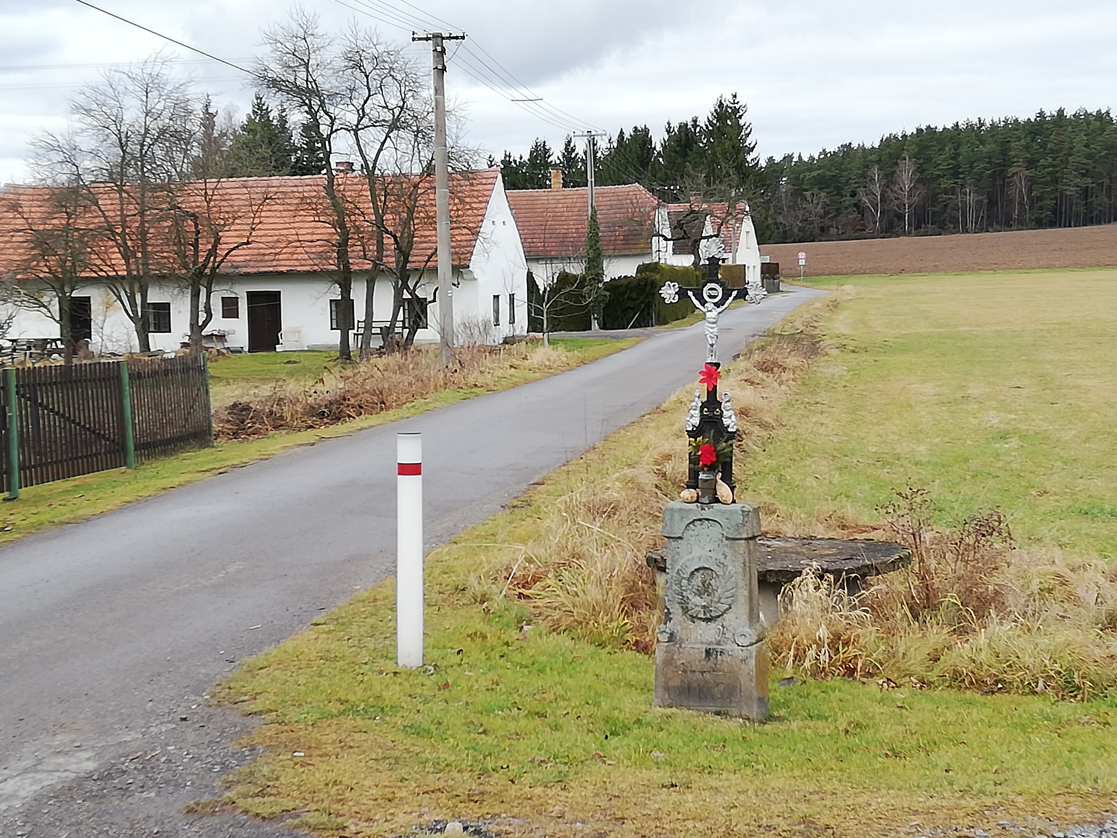 Svatý Jan nad Malší (Hrachovy Hory) - křížek